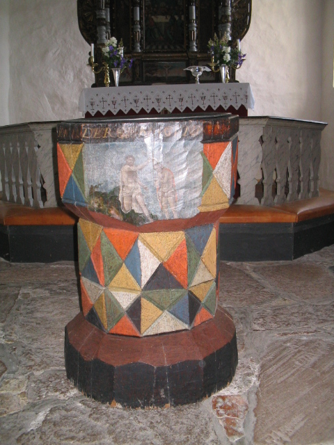 Døpefont Skoger gamle kirke, Drammen